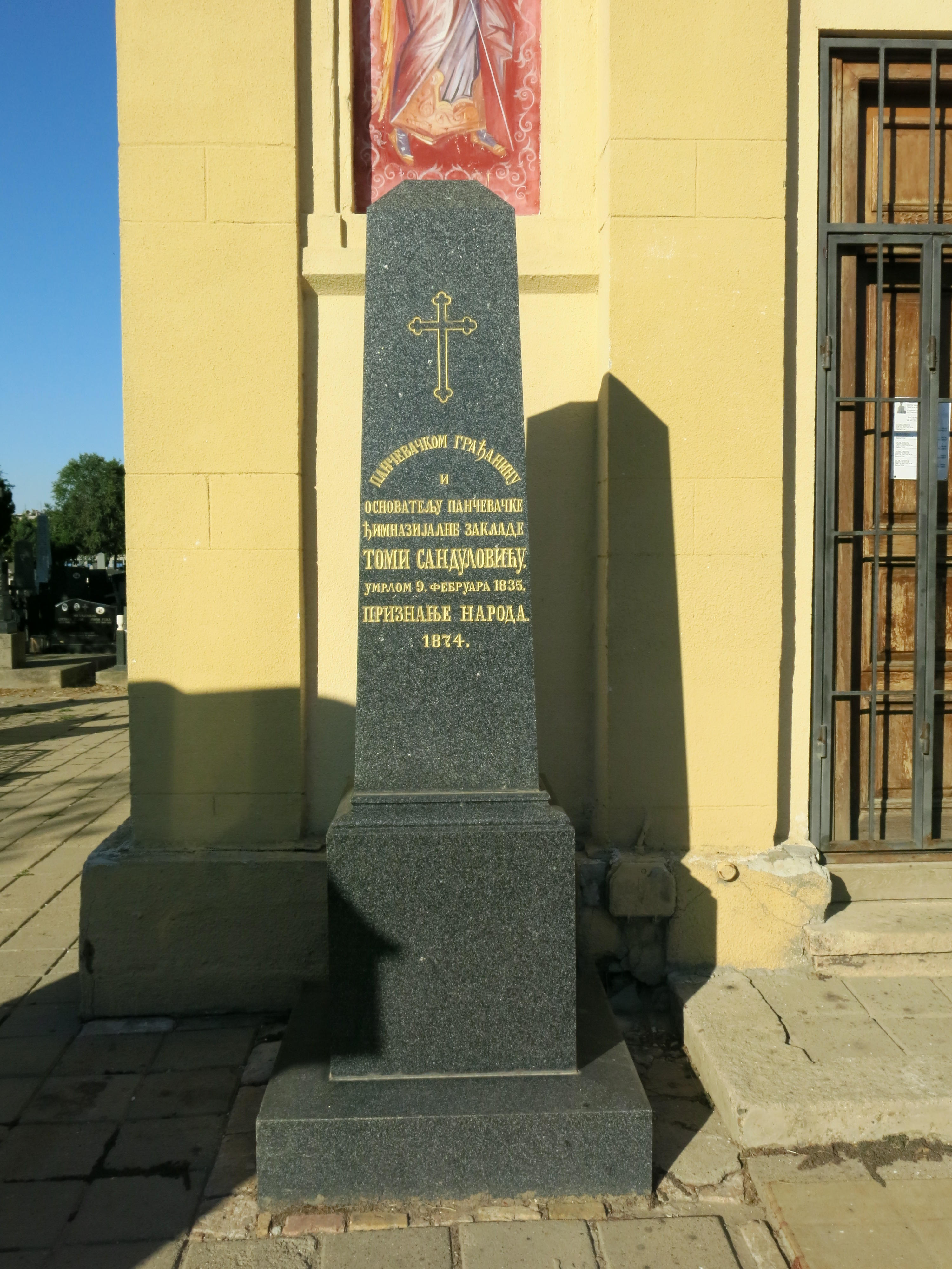 Надгробни споменик Томи Сандуловићу